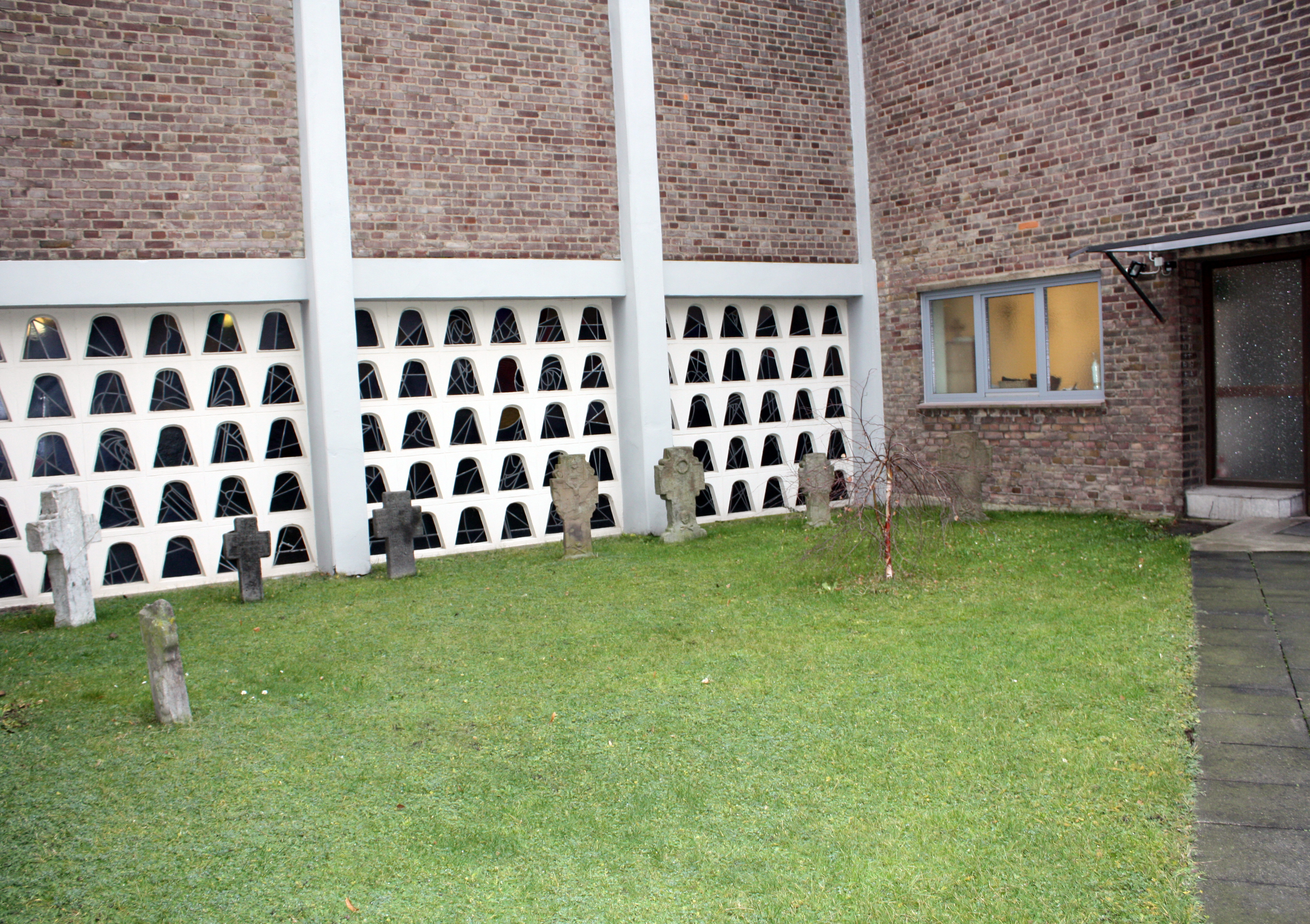 Kendenich,alter Kirchhof St. Johann Baptist